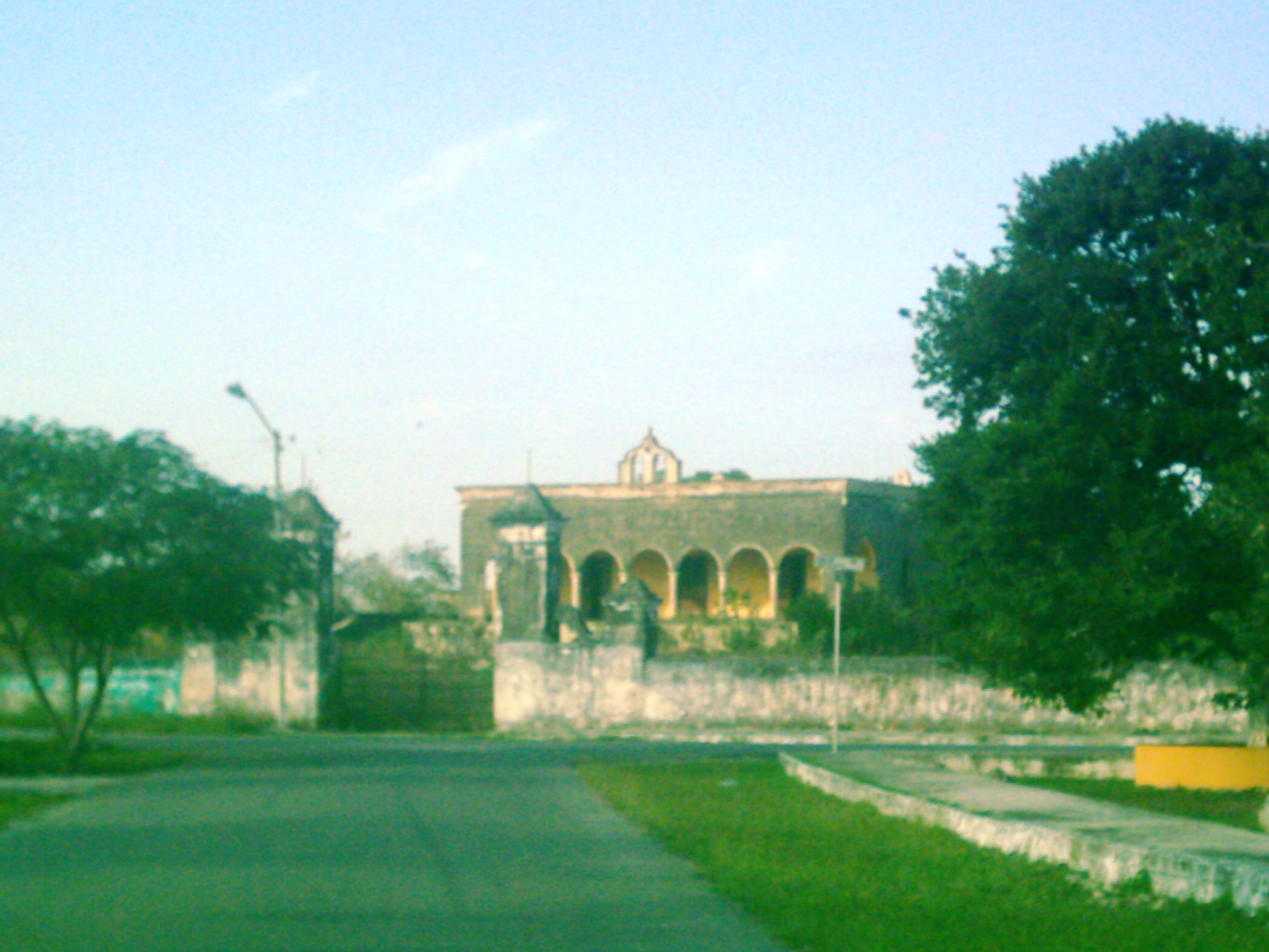 Hacienda de San Antonio Hool, Yucatán.